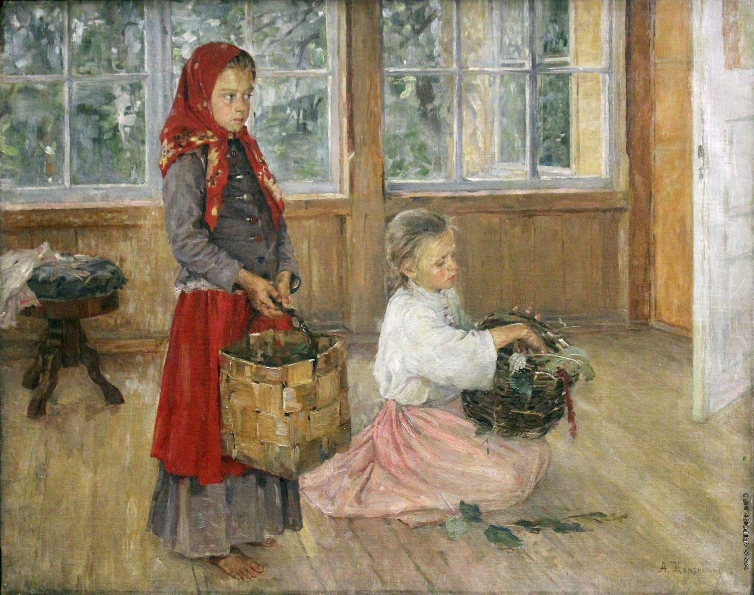 Дети на террасе Год создания 1887 Материал Холст, масло Собрание Национальный художественный музей Республики Беларусь